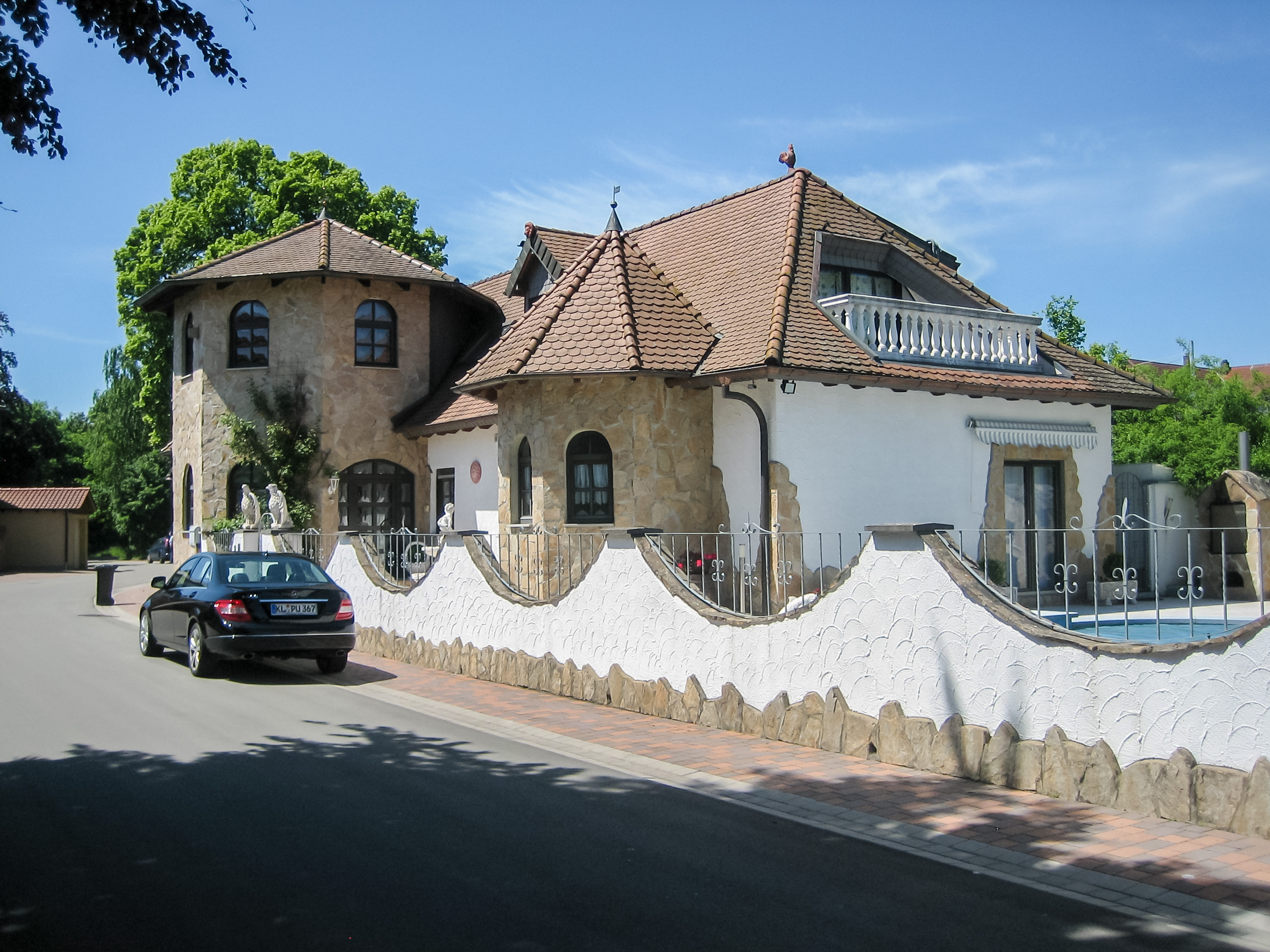 Das inzwischen umgebaute Empfangegebäude des Bahnhof Rodenbach